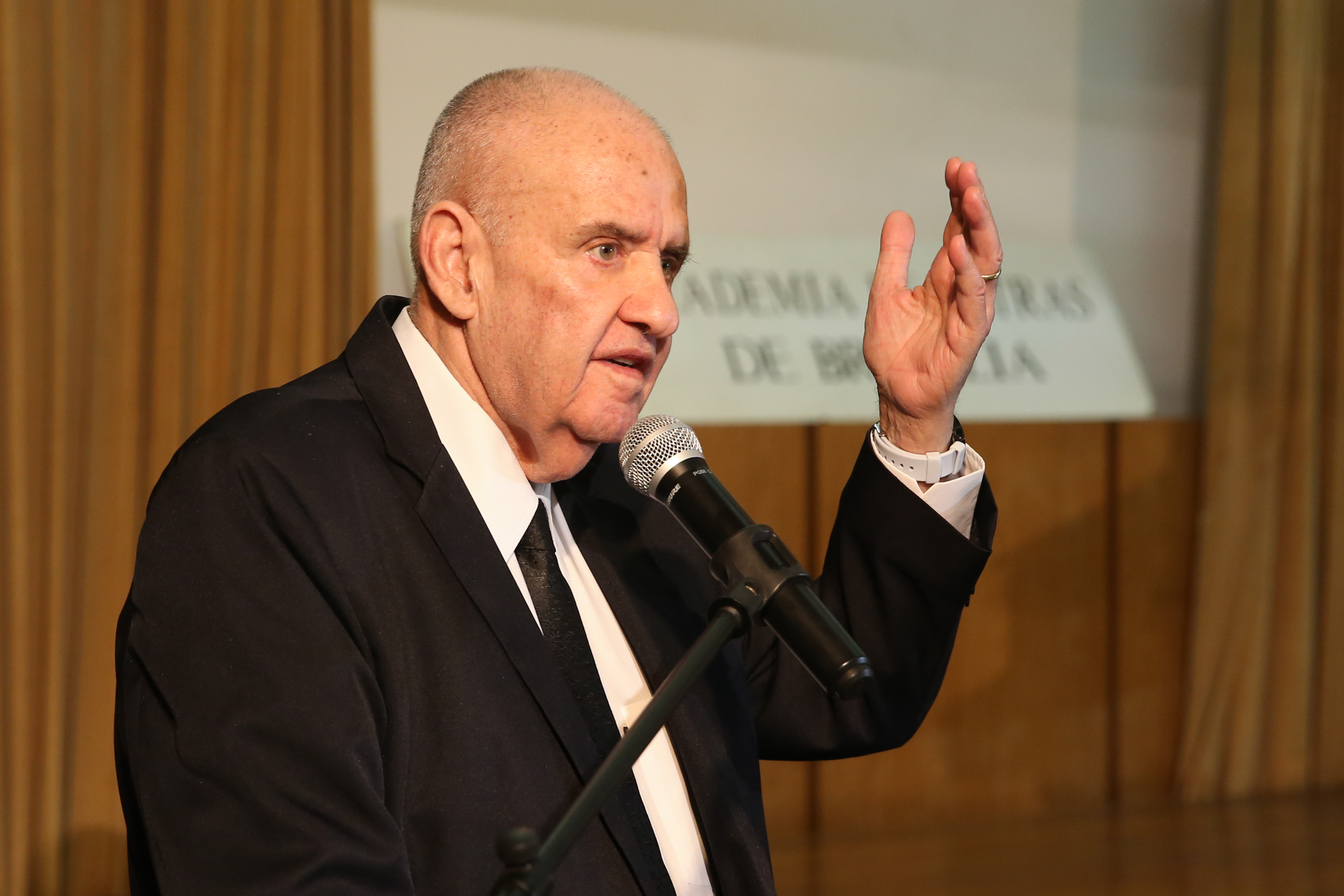 Brasília - O poeta Carlos Nejar é homenageado pela Academia de Letras de Brasília (ACLEB) em evento na Embaixada de Portugal. Carlos Nejar concorre ao Prêmio Nobel de Literatura 2017 (Valter Campanato/Agência Brasil)